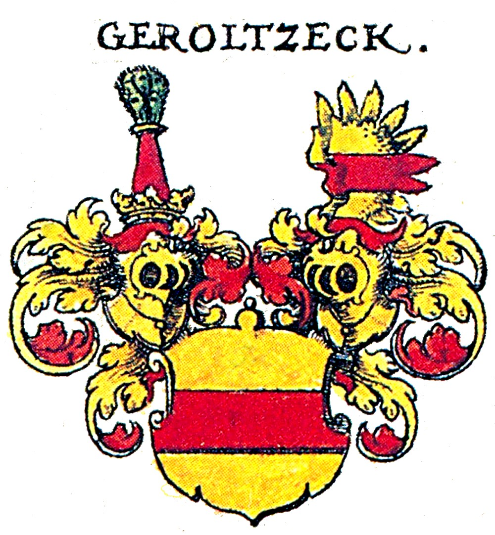 Johann Siebmacher: New Wappenbuch Herren und Freiherren Geroldseck